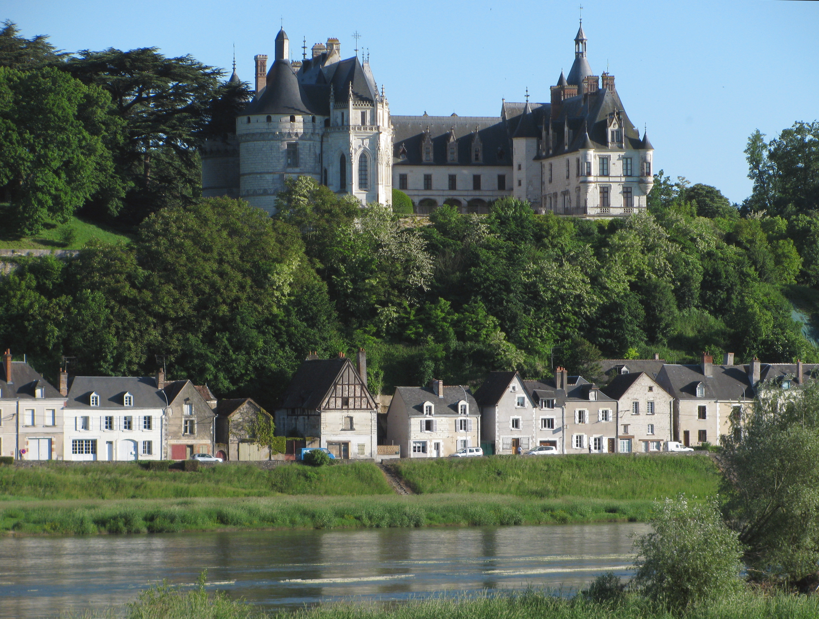 Château de Chaumont-sur-Loire, Departement Centre/Frankreich - Ansicht vom anderen Ufer der Loire